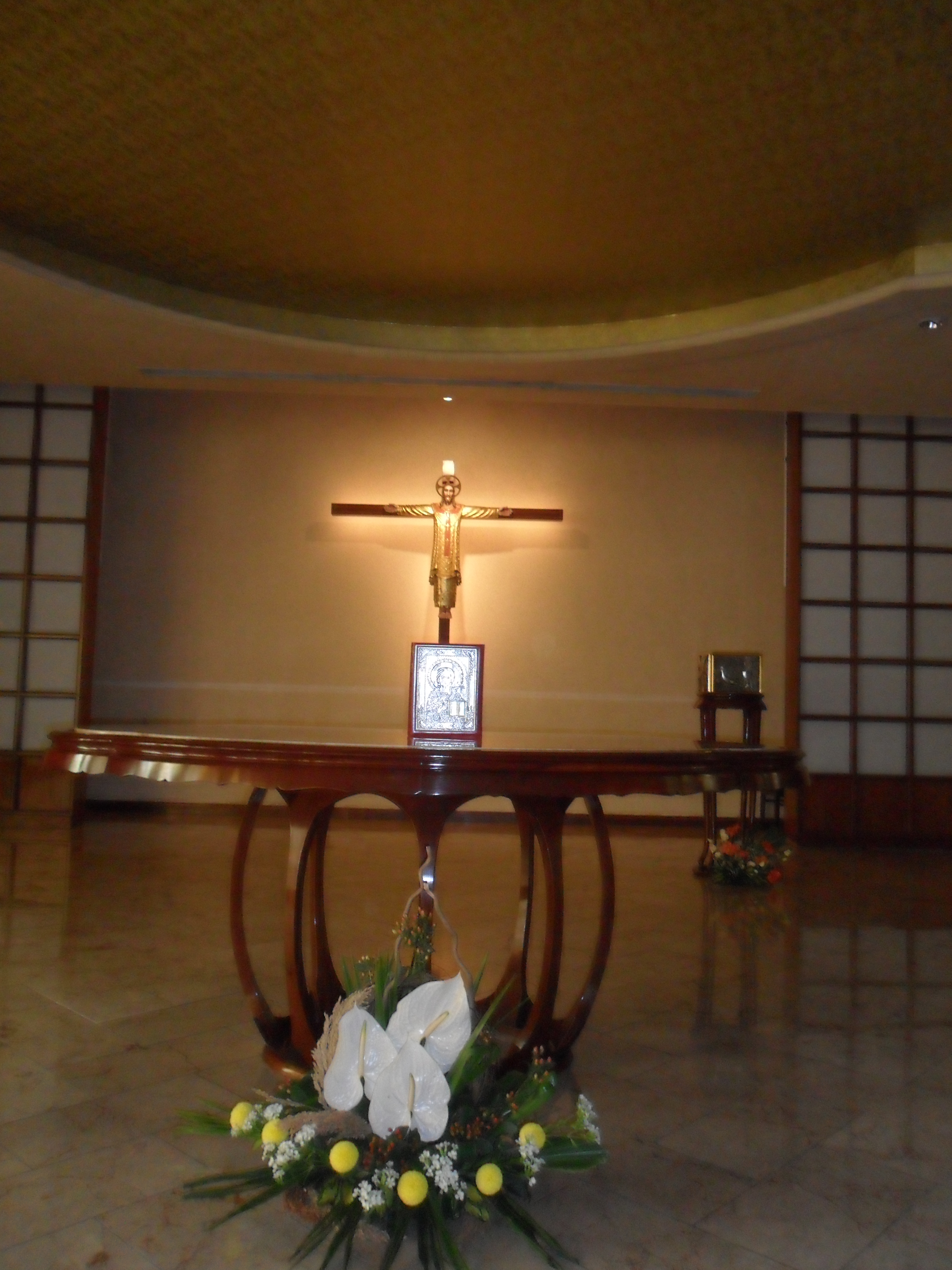 中文（香港）: 聖斯德望堂, 香港, 中國